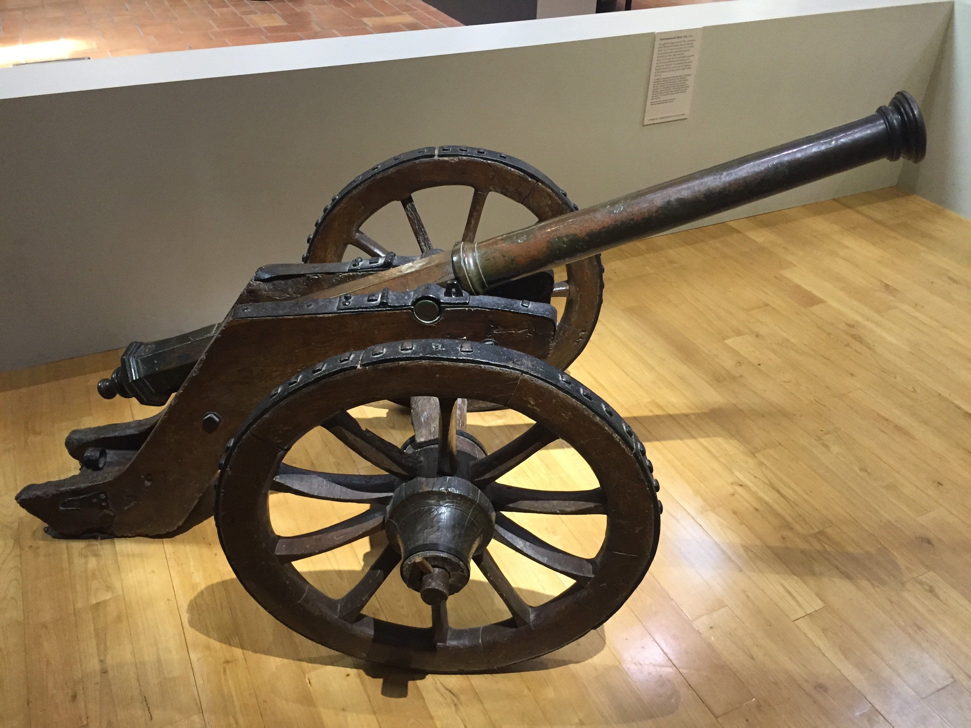 En 1588 les huguenots de l'Isle-Jourdain place forte protestante, avaient attaqué Saint-Lys. L'année suivante, les consuls de Toulouse firent fondre deux fauconneaux pour défendre la ville, dont subsiste celui-ci. Il s'agit du seul exemple conservé de l'art des artilleurs toulousains, à la technicité réputée. Les quatorze fleurs de lys qui ornaient le canon ont été limées à la Révolution, période où fut refait l'affût de bois. Conservé à la médiathèque Albert Camus de Saint-Lys.